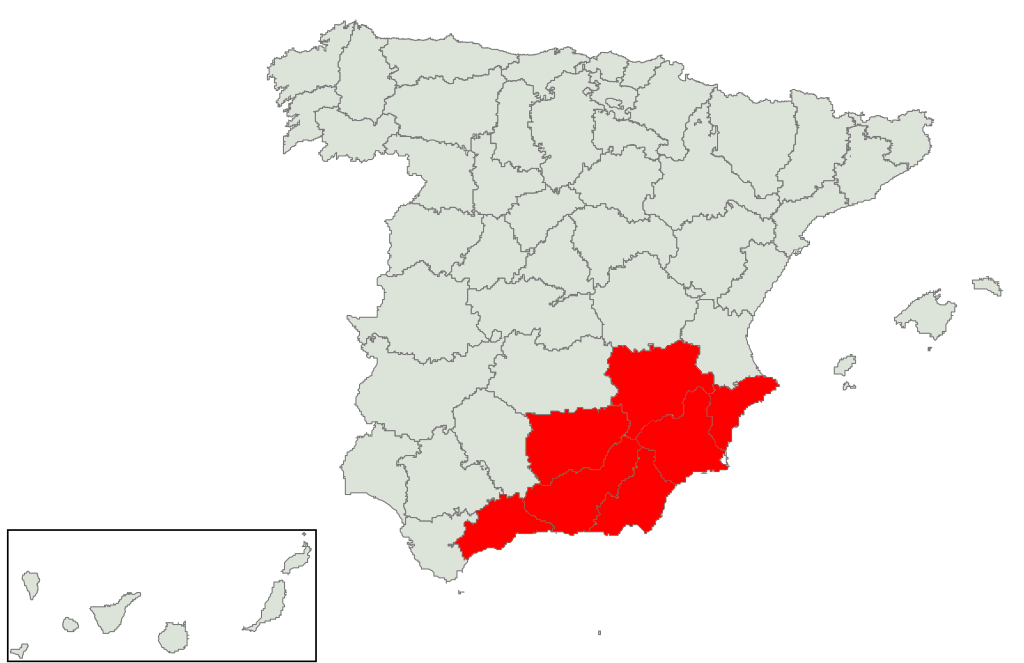 Región del Sureste reclamada por la Federación de Independientes del Sureste